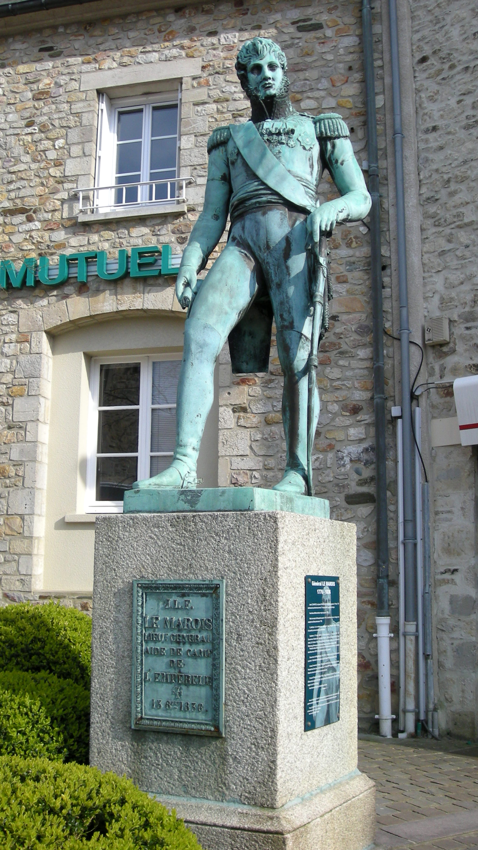 Monument à la mémoire du général Le Marois à Bricquebec (Manche, Normandie, France)